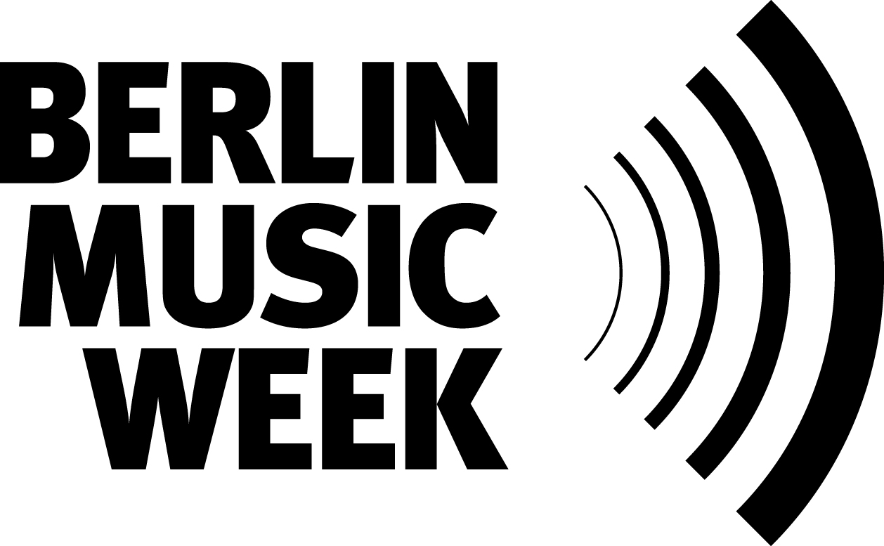 Offizielles Logo der Berlin Music Week